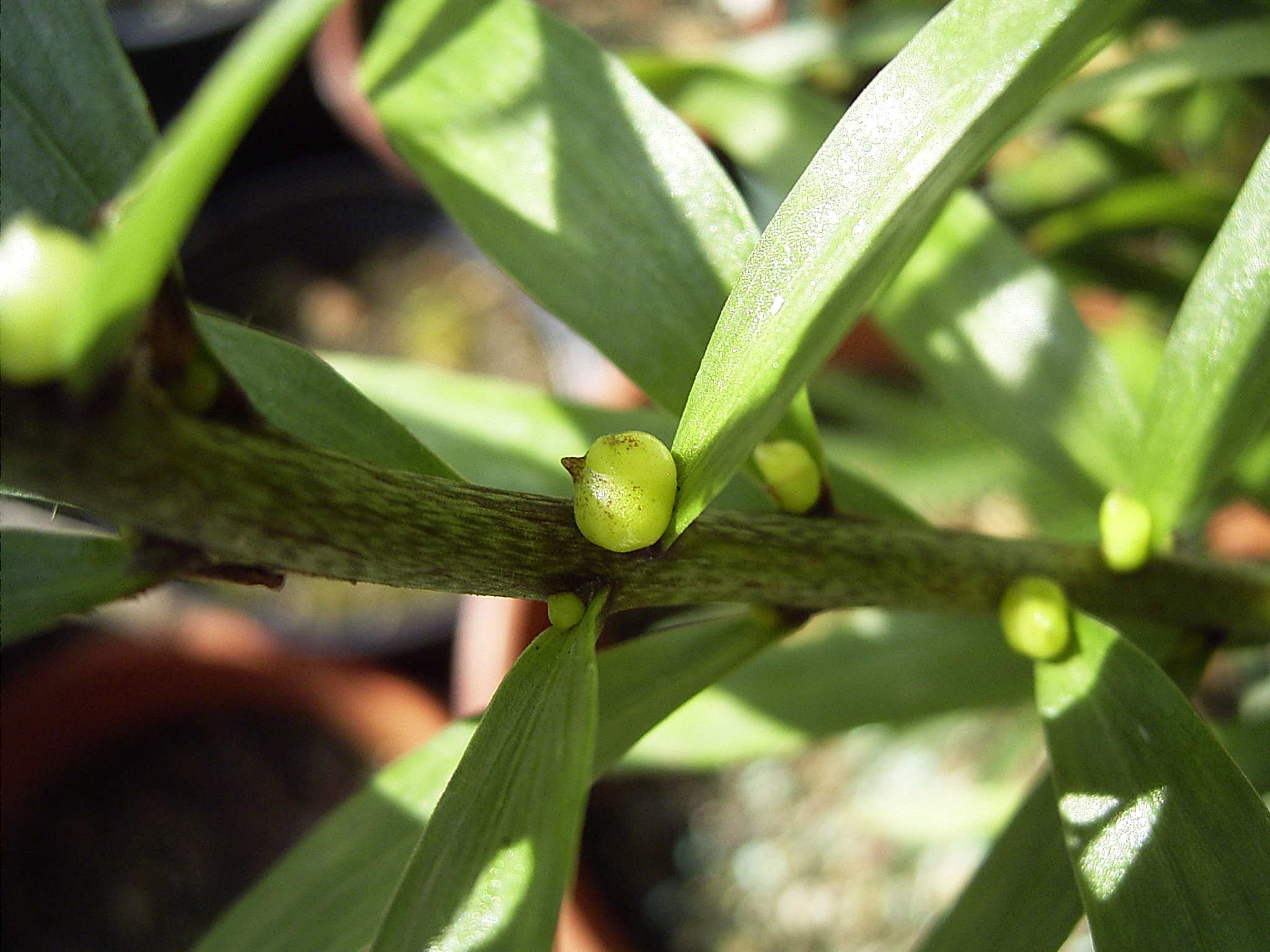 Axil bulbils Lilium sargentiae